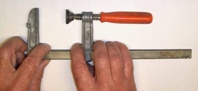 verschuiven van arm van een lijmklem